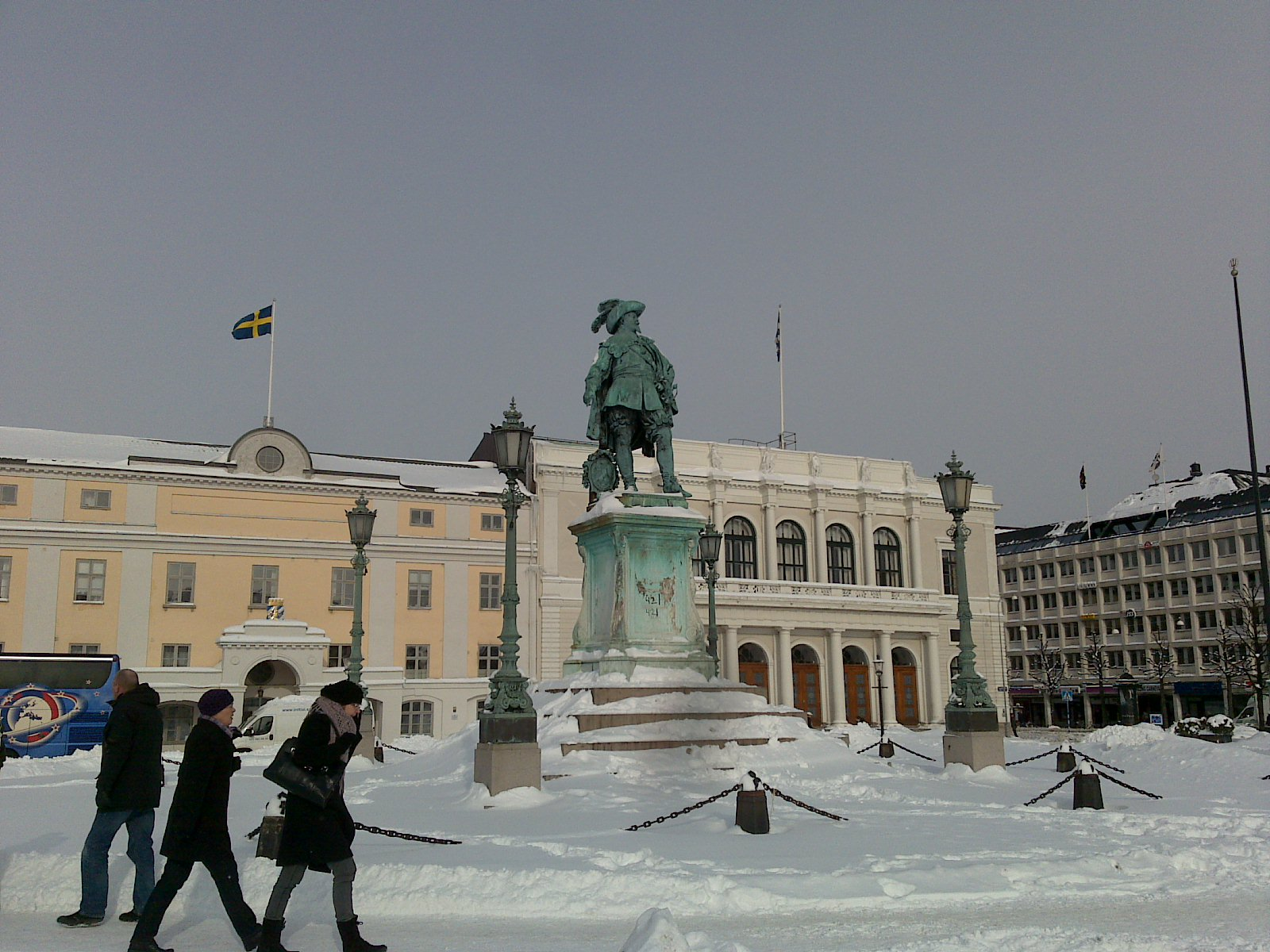 Nordstaden, Gothenburg, Sweden